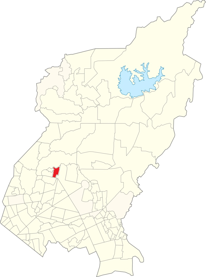 Filipino: Mapa ng Sto Cristo sa Siyudad Quezon